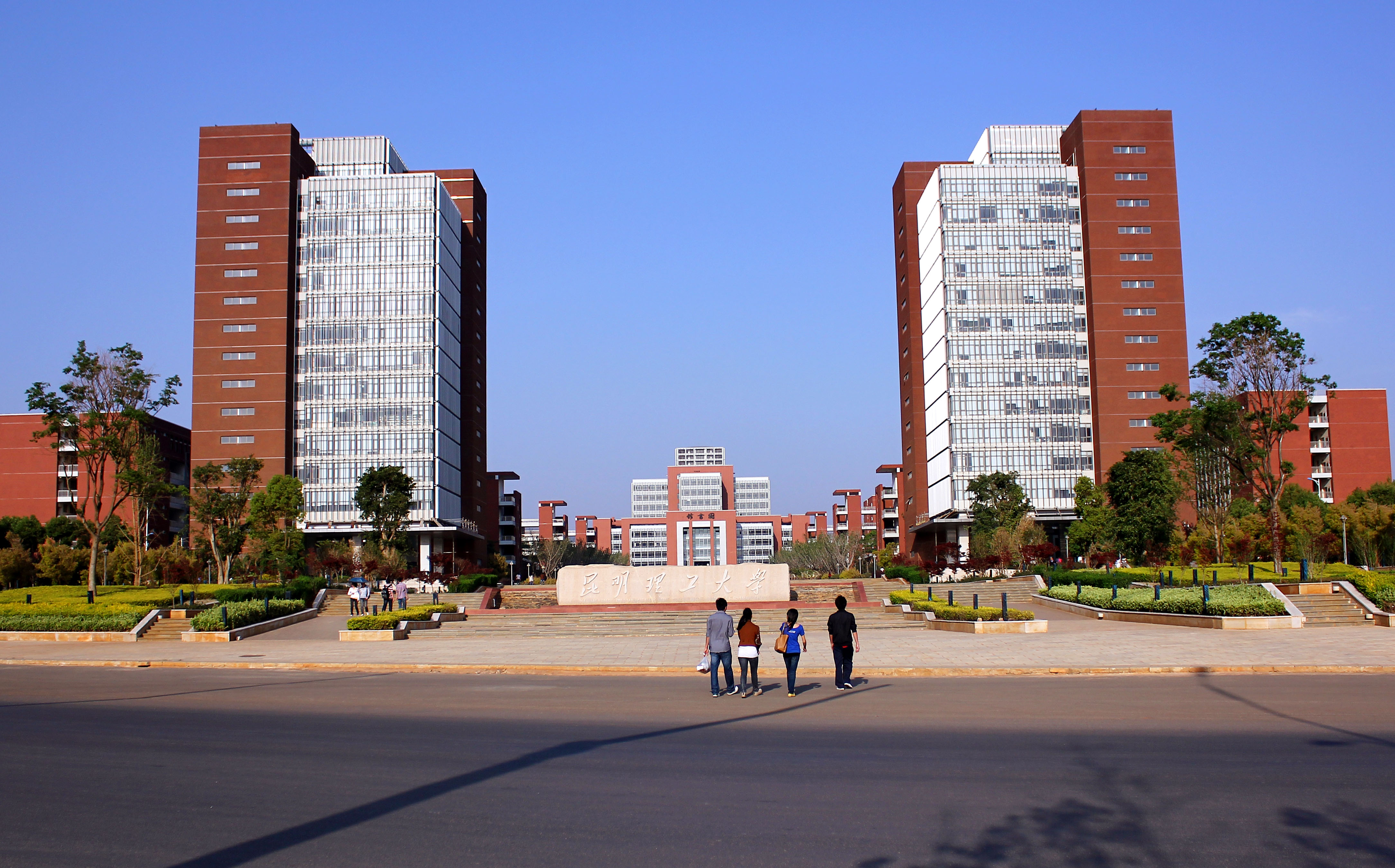 昆明理工大学呈贡校区正门